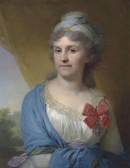 Дарья Александровна Валуева, ур. Кошелева (1757-1836), жена П.С.Валуева (1743-1814).